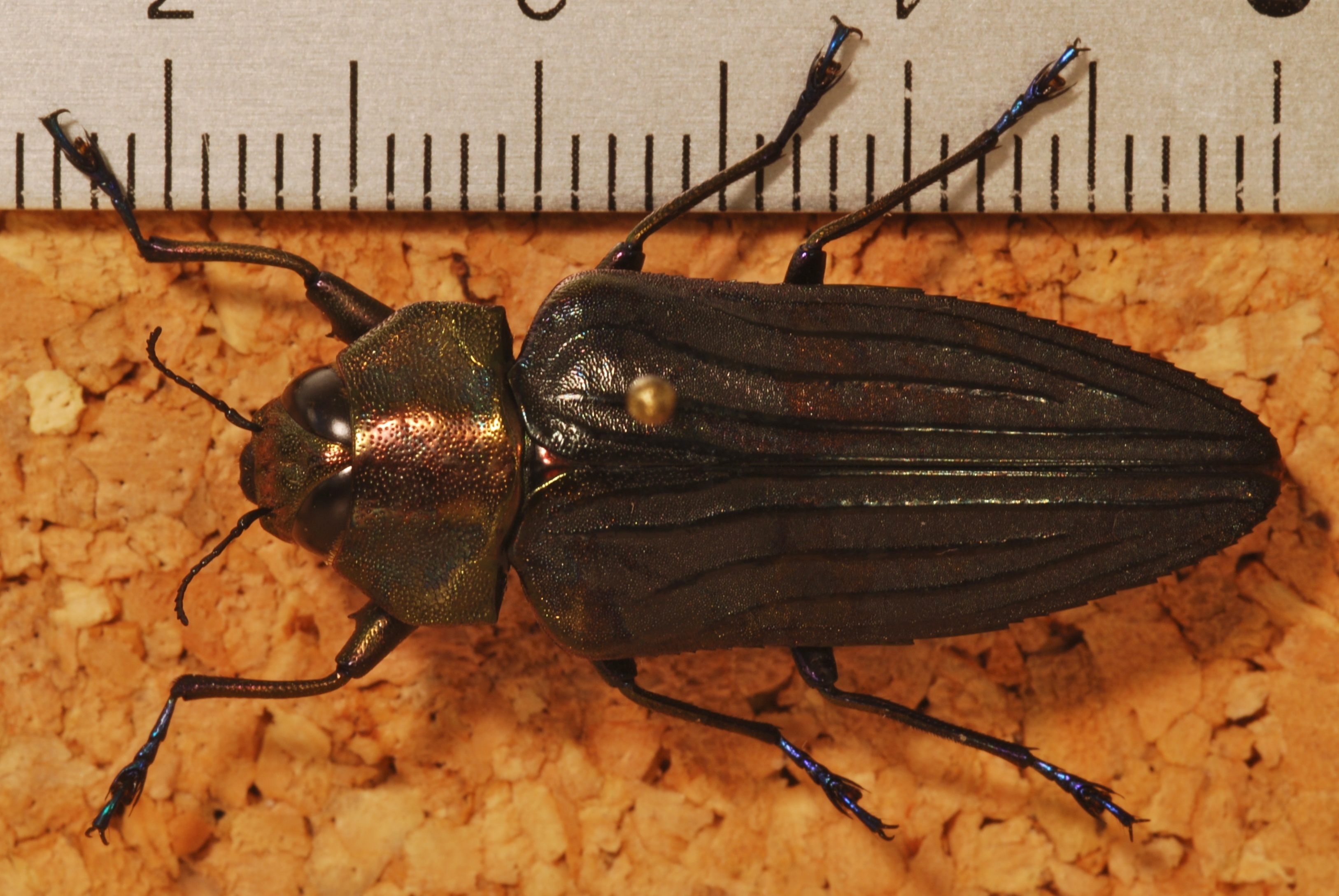 Santa Rosa NP, COSTA RICA